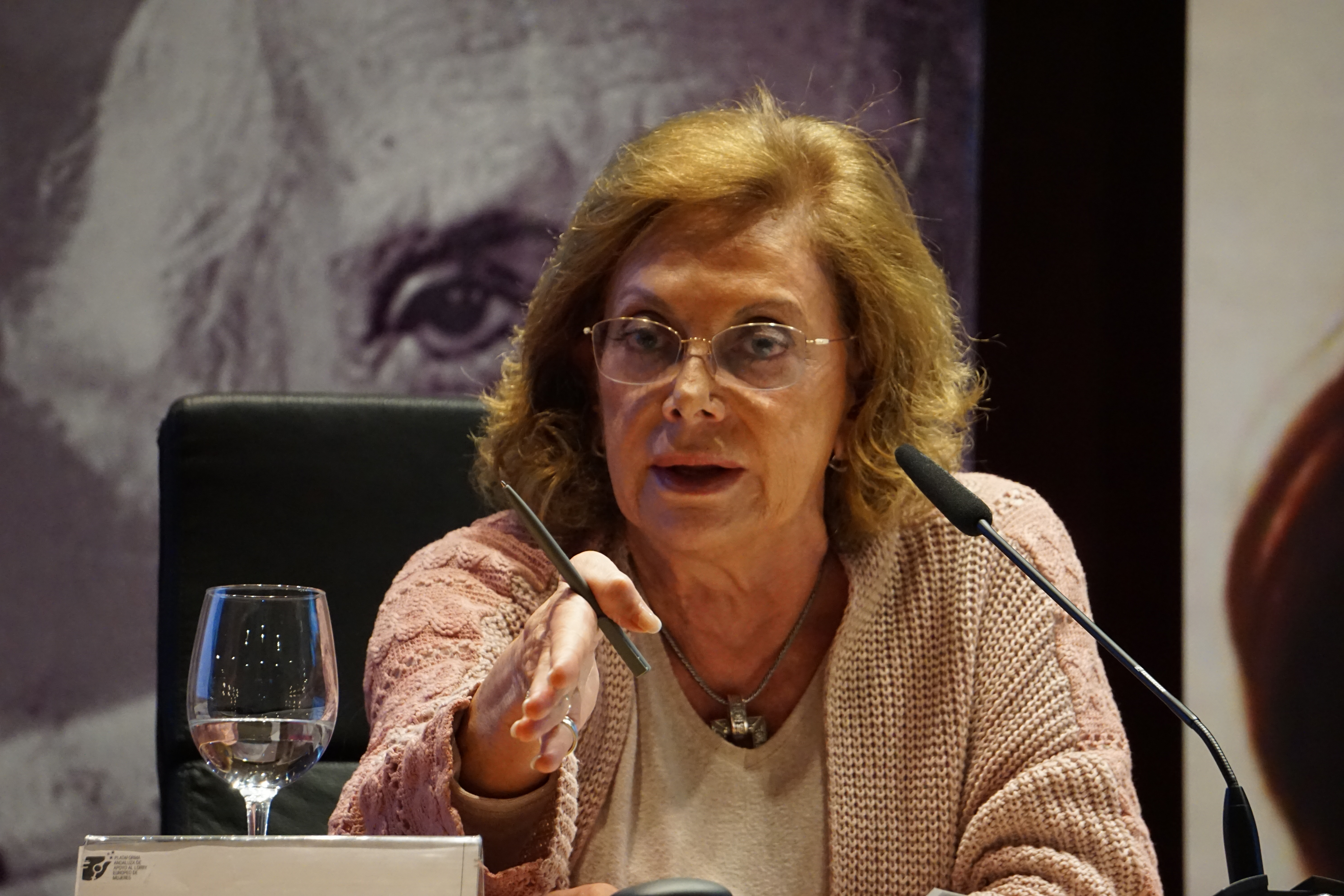 Córdoba Feminario 2017